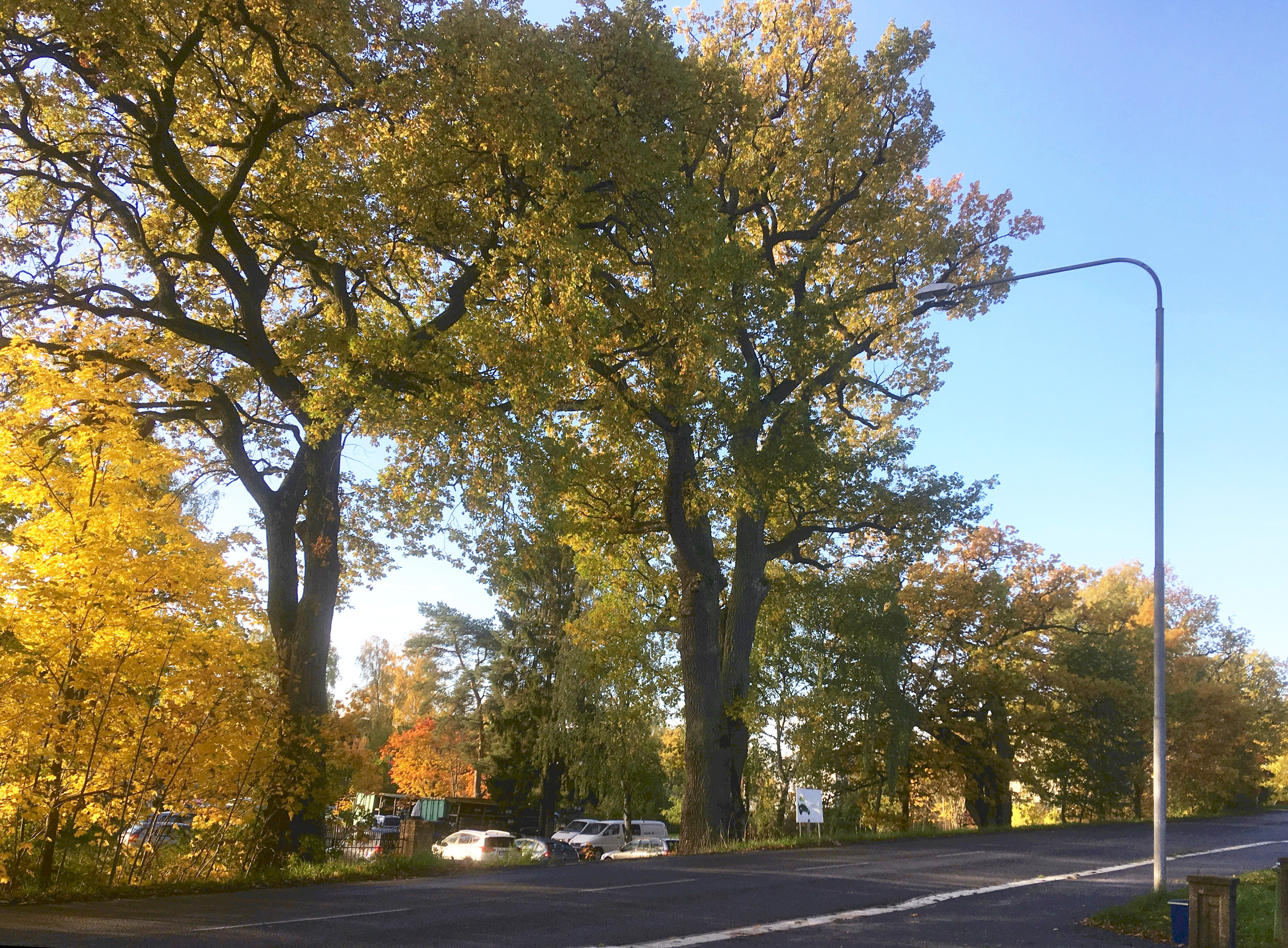 Den naturminnesmärkta eken vid Gamla Södertäljevägen i Segeltorp.